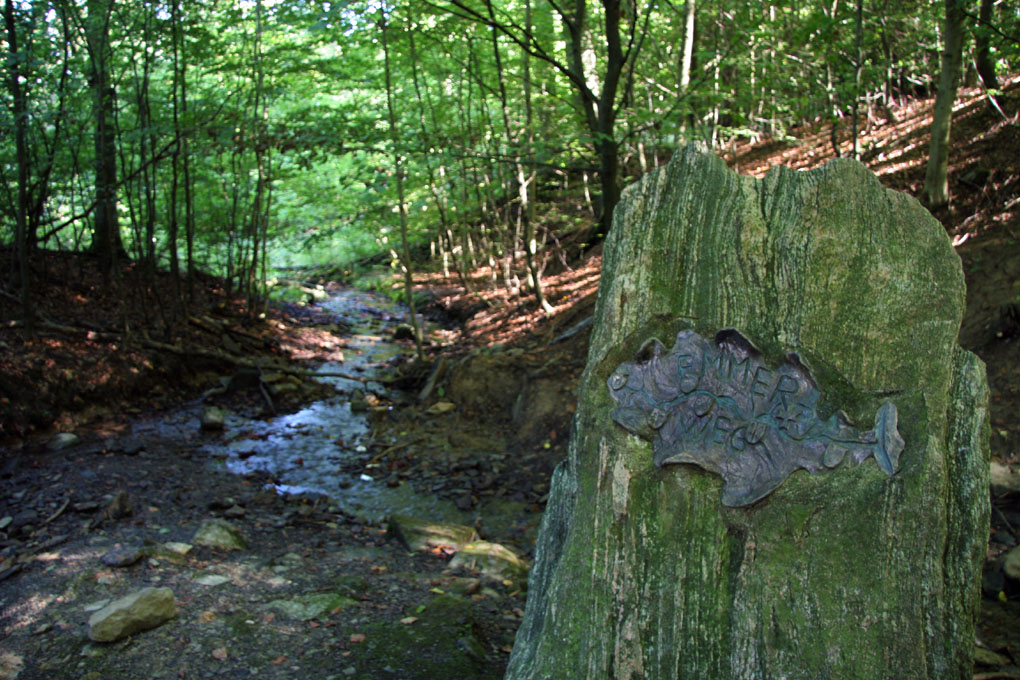 Die Quelle der Emmer südwestlich von Langeland, Bad Driburg, Nordrhein-Westfalen, Deutschland; im Vordergrund die Plakette des Emmerwegs.